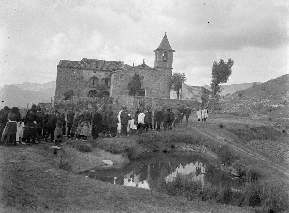 Grup de persones que van cap a l'església de Sant Martí Sacalm. Enric Ribas i Virgili (Entre 1920 i 1930)